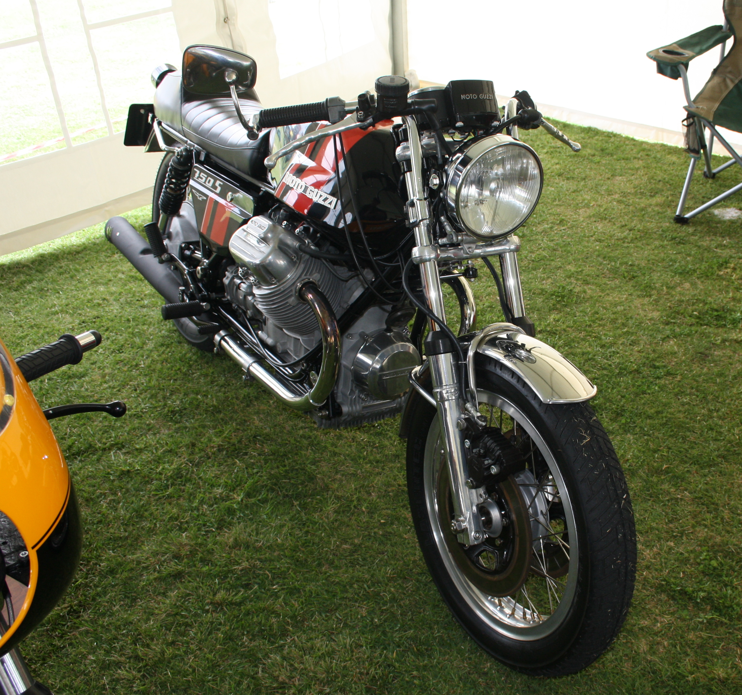 Moto Guzzi 750S